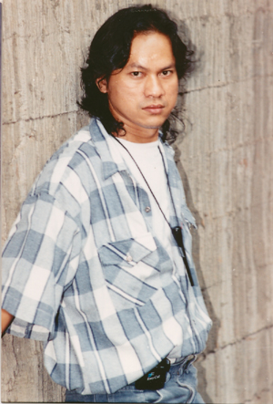 golagong